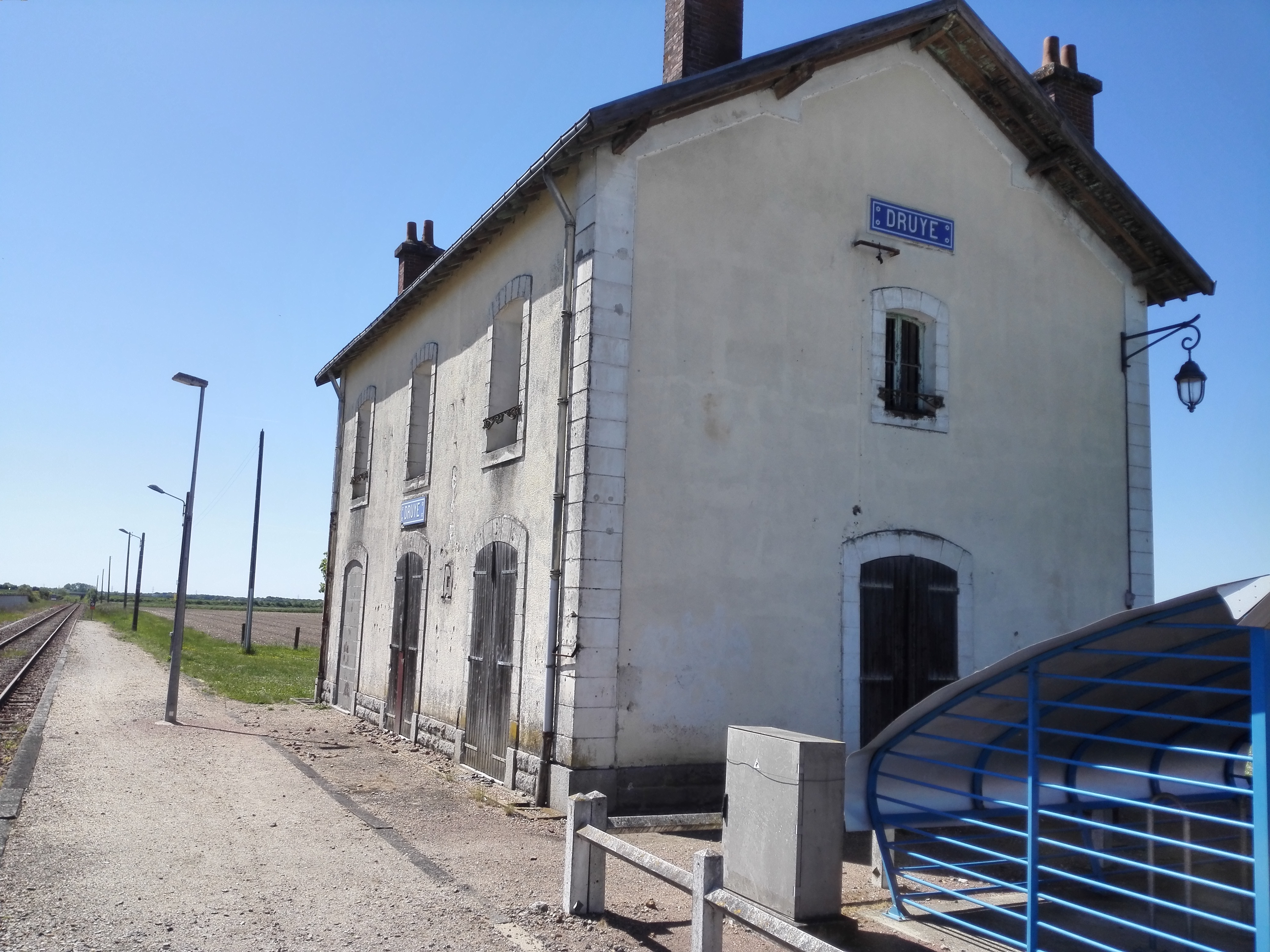 Gare de Druye (Indre-et Loire, France). Le bâtiment n'est plus utilisé comme gare, mais un arrêt ferroviaire est encore en fonction à cet endroit